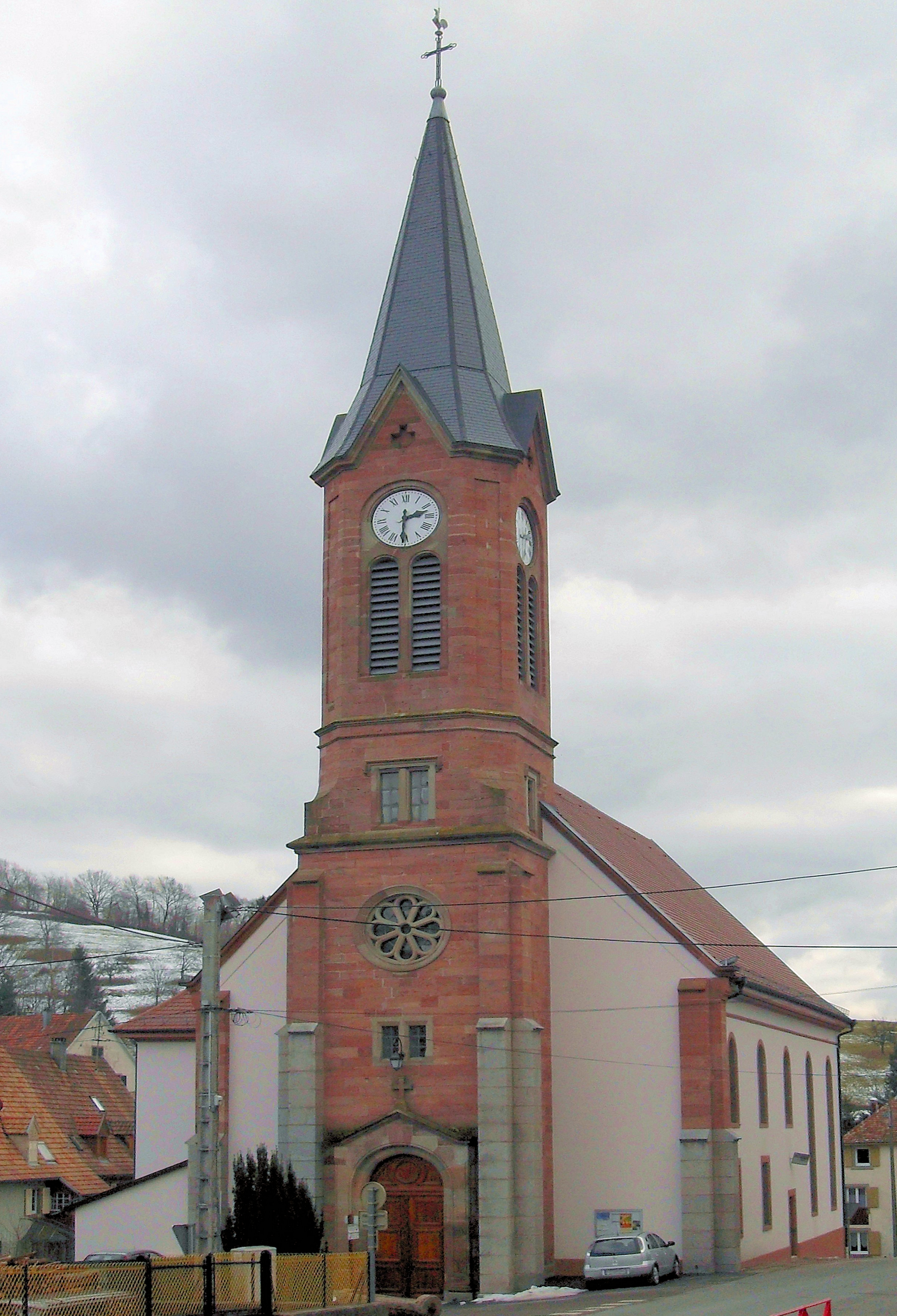 L'église protestante de Soultzeren